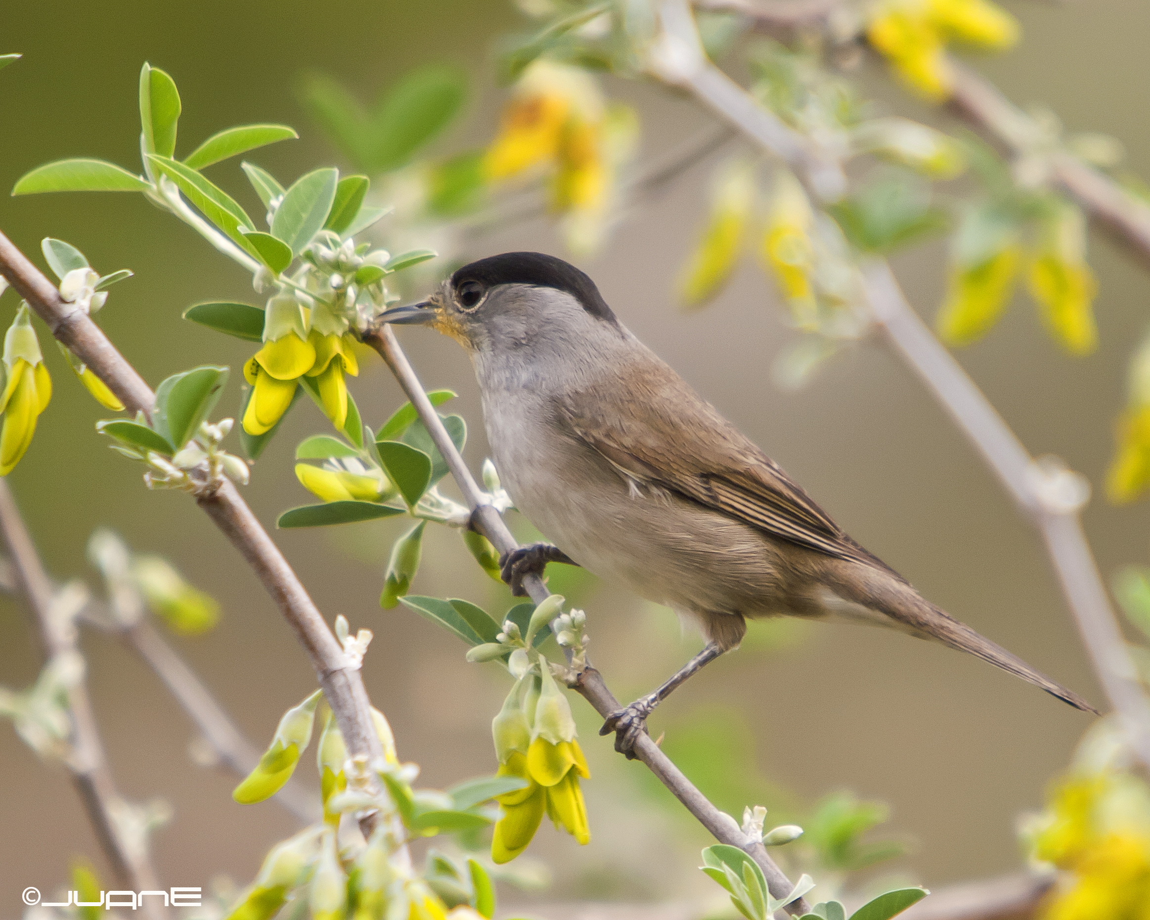 Curruca Capirotada.( Sylvia atricapilla heineken)(♂)